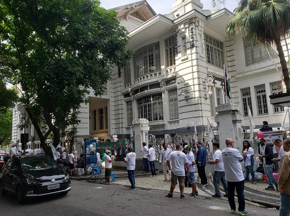 Entrada do Fluminense Football Club na eleição para presidente em 2019.